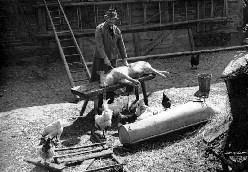 Schlachtung eines Schweins Illus/Erich O. Krueger Hausschlachtung Aufnahme 1947 525-47